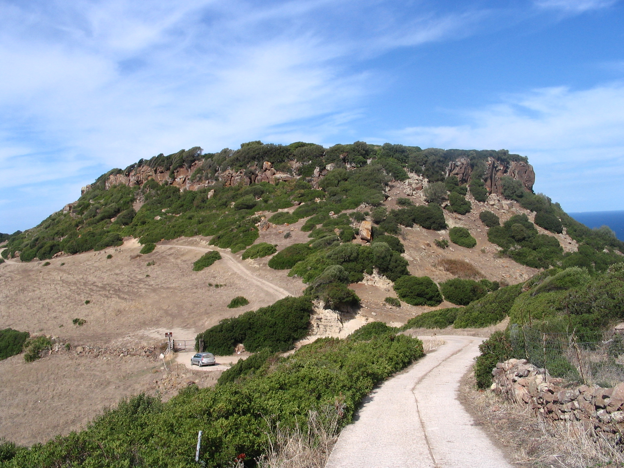 Mountain between Tergu and Castelsardo